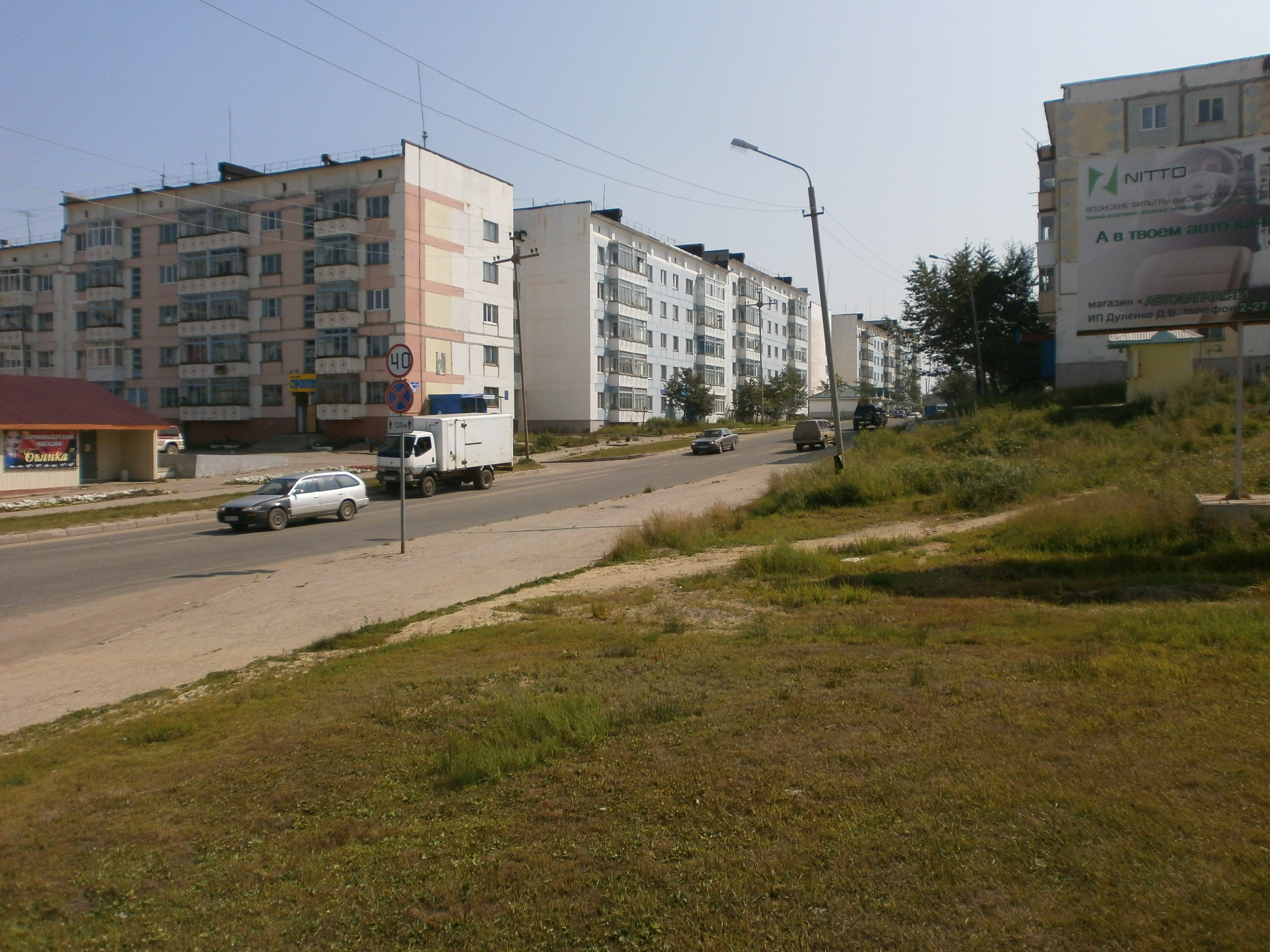 オハ市街。投稿者本人による撮影